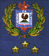 brasão